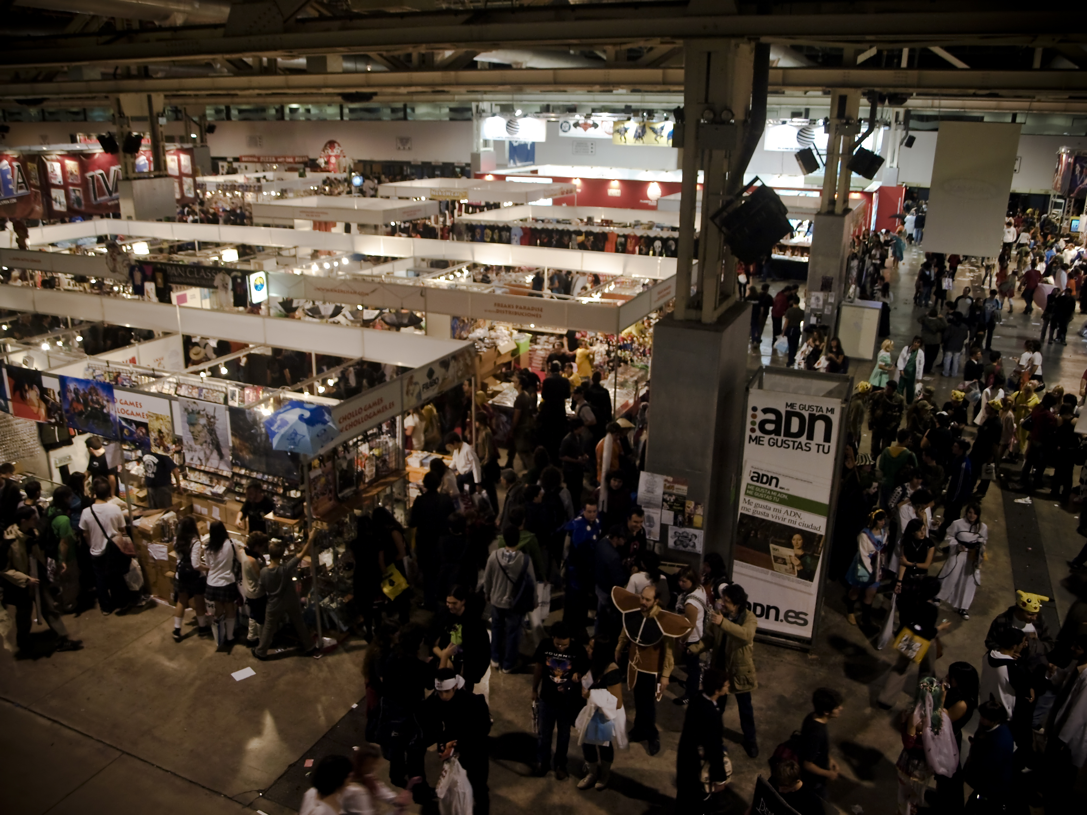 Salón del Manga de Barcelona, 2008. España.